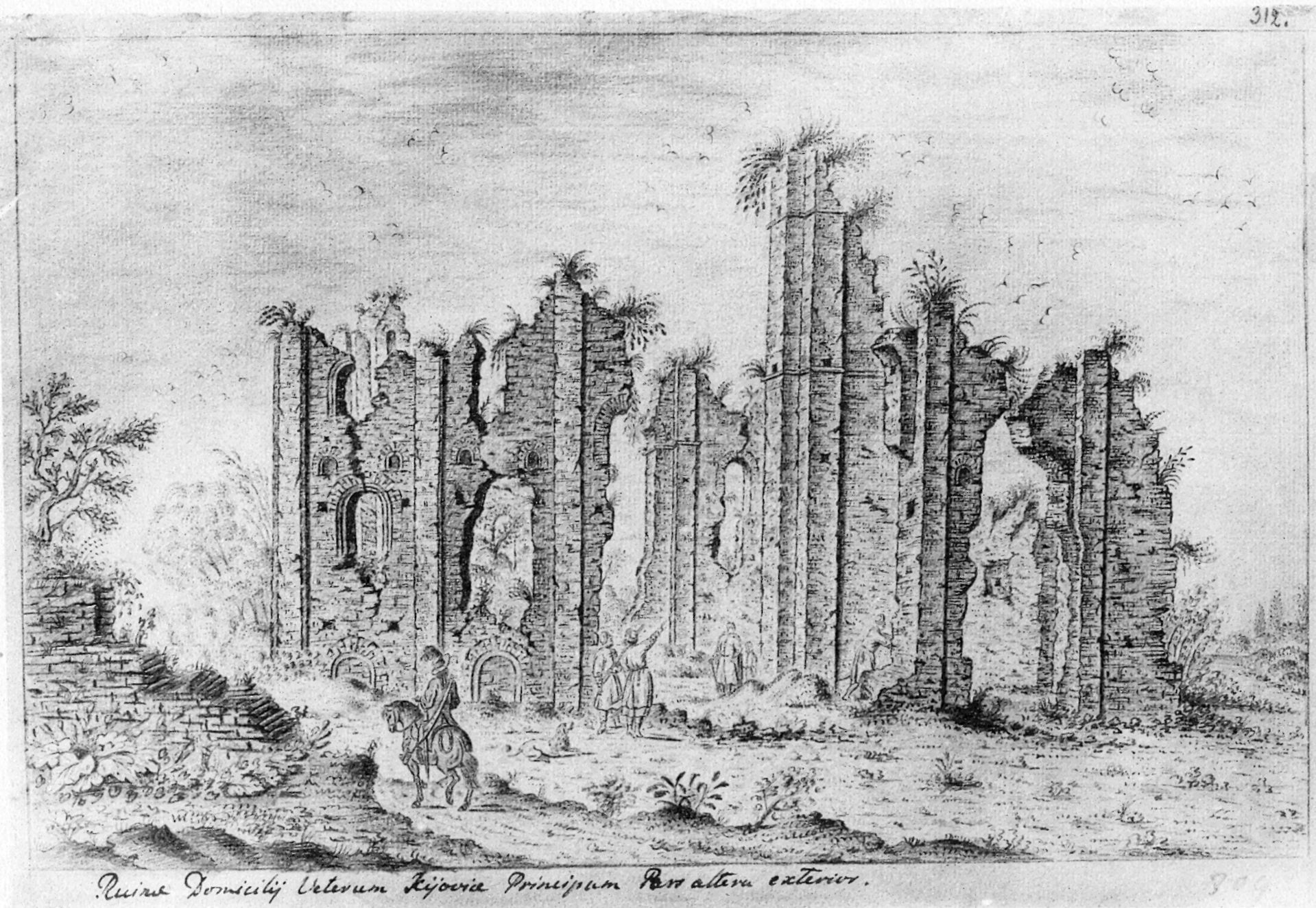 Руїни Собору Федорівського (Вотча) монастиря за малюнками А. ван Вестерфельда 1651 р.